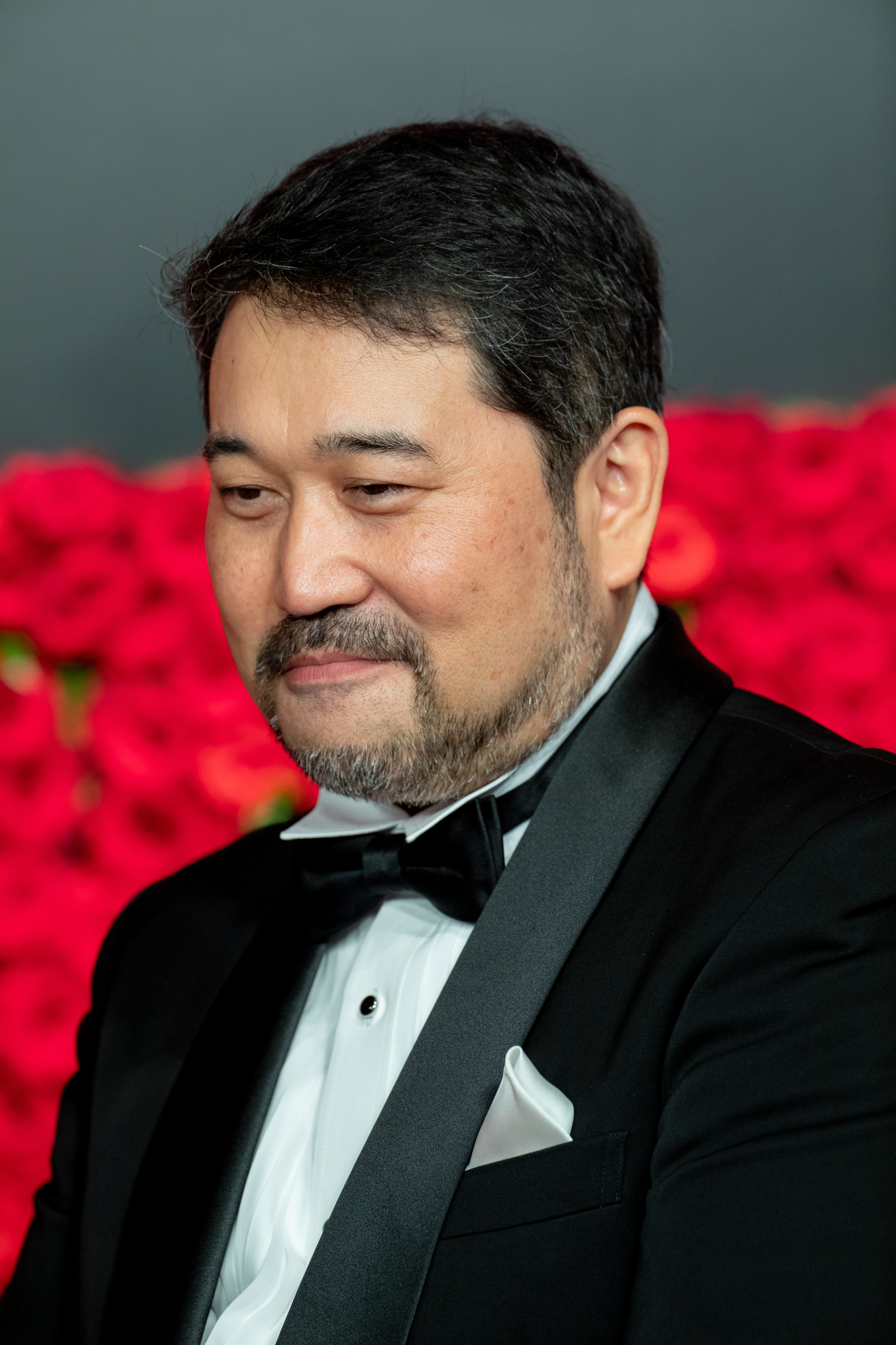 第30回 東京国際映画祭 オープニングセレモニー 瀬下寛之 (GODZILLA 星を喰う者)